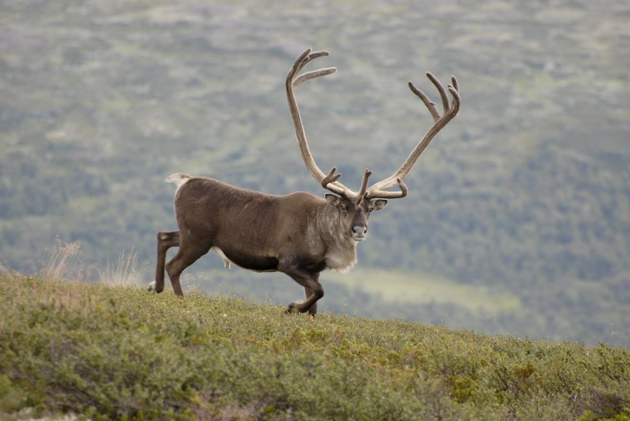 Norsk villrein Rangifer tarandus tarandus (fjellrein, tundrarein)